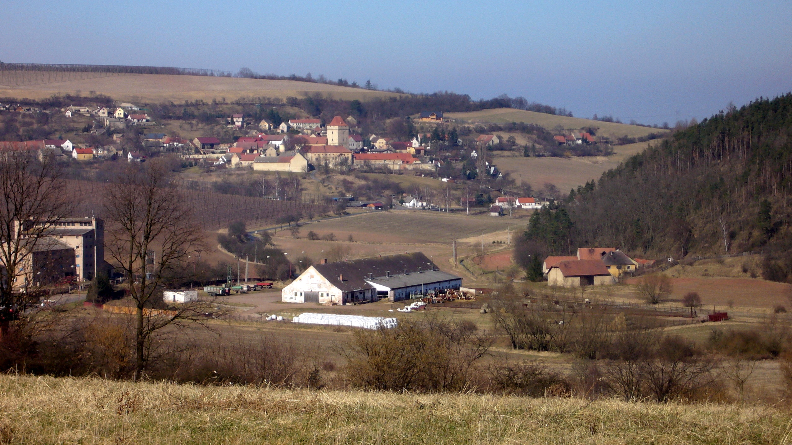 Vinařice - pohled z hradu na vesnici Divice s tvrzí